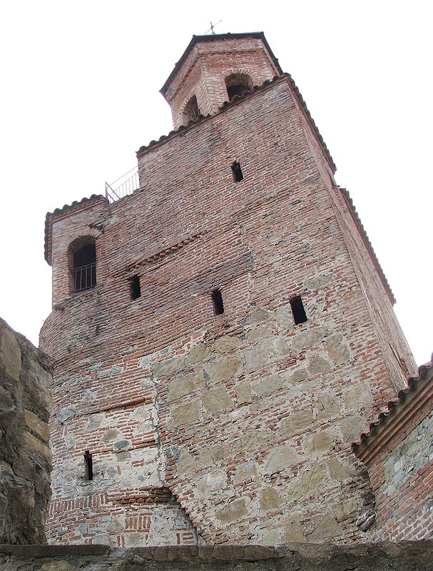 Gremi (გრემი)